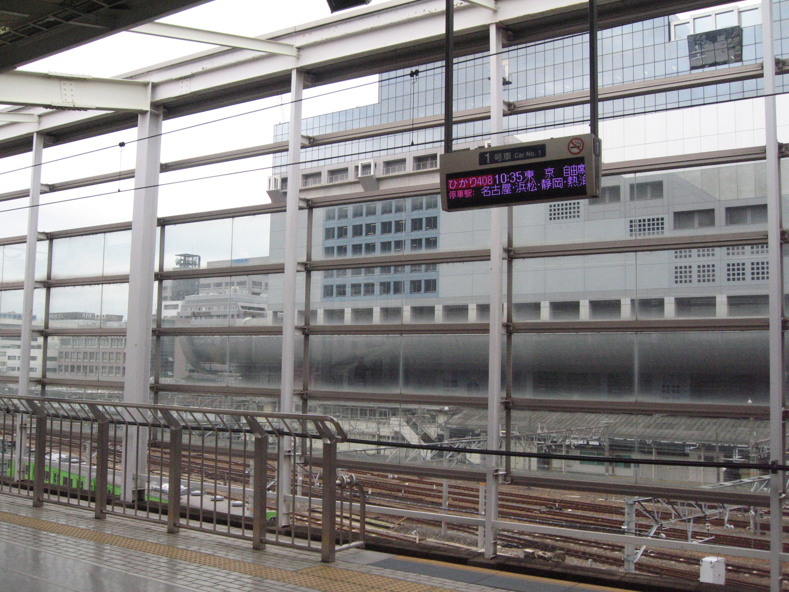 Kyoto Station, Kyoto, Kansai Region.